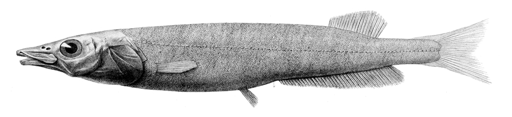 Conocara macropterum